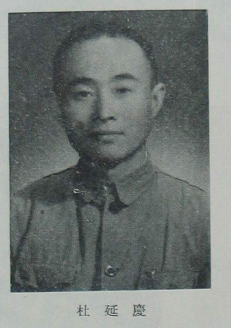 中文（台灣）: 中國人民政治協商會議第一屆全體會議代表